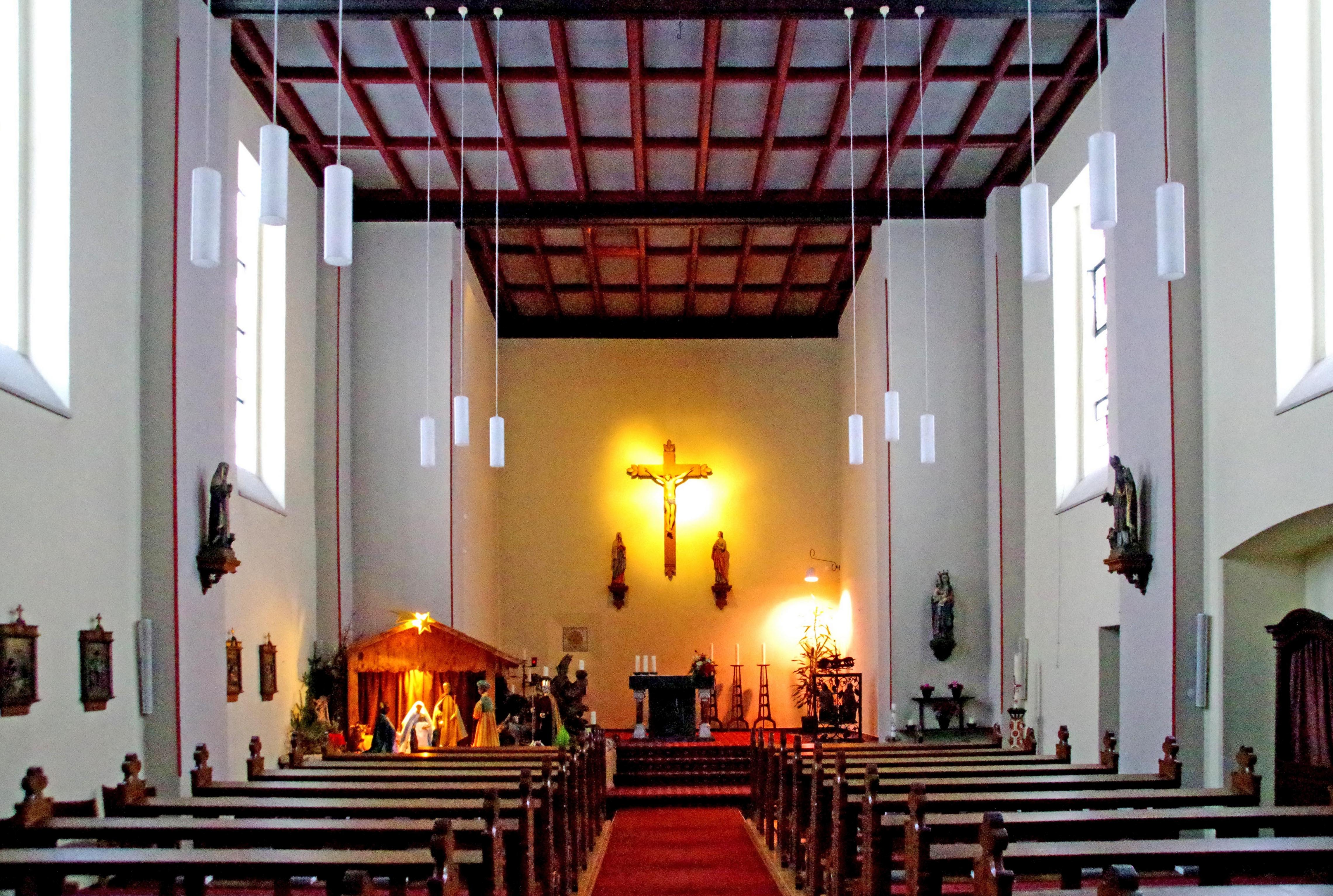 St. Nikolaus, Innenraum mit Blick zum Altar